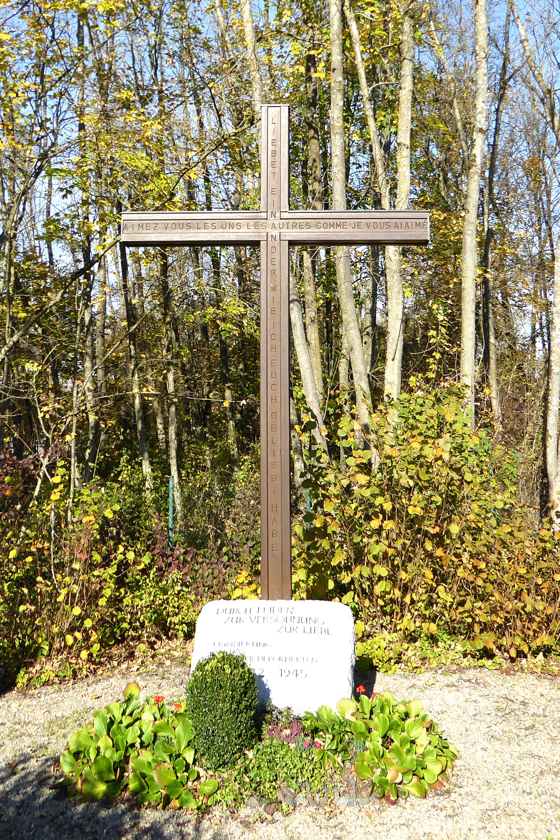 Versöhnungskreuz in Erinnerung an das Zwangsarbeiterlager, das sich dort im Zweiten Weltkrieg befunden hat.